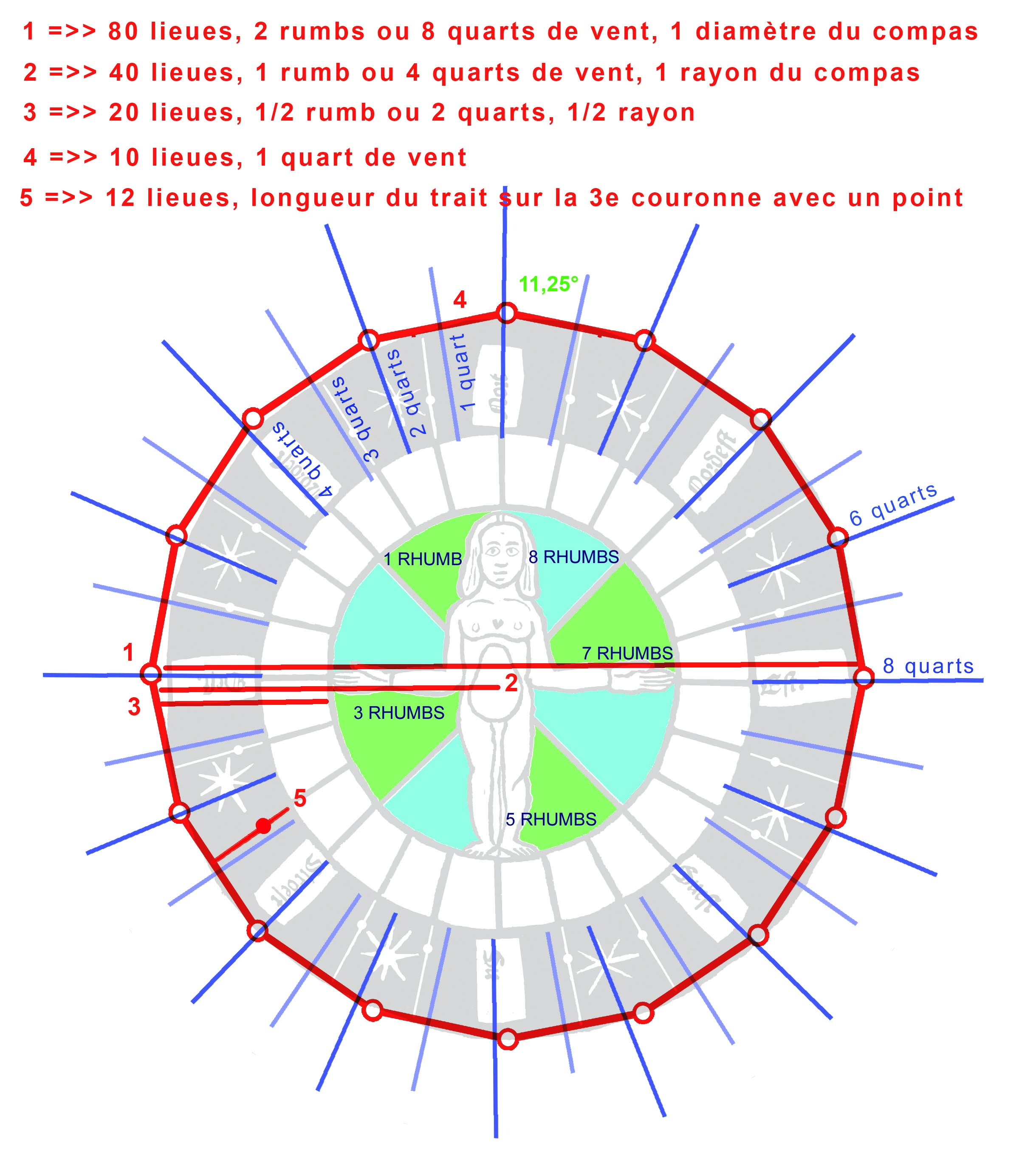 Roue Pôle-Homme, cadran compas, dérive